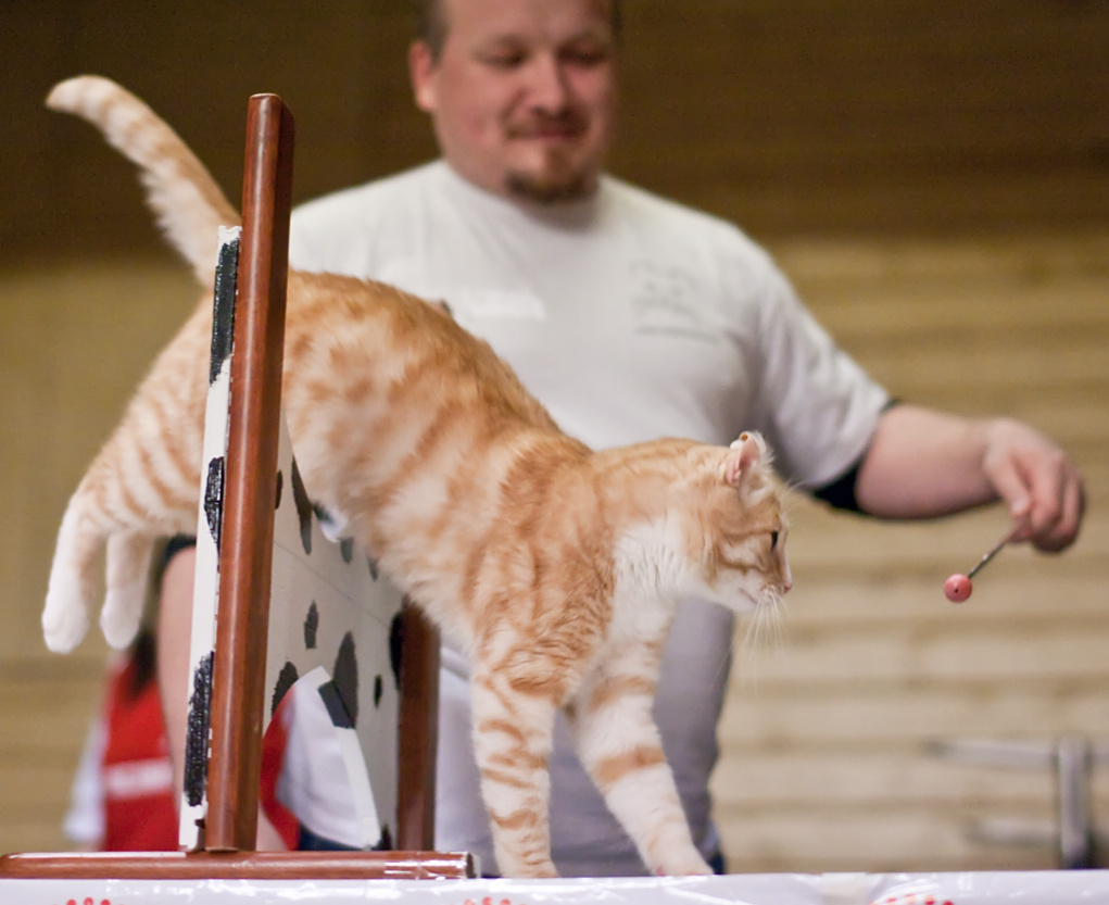 Un american curl à poil court réalise un parcours d'Agility félin durant l'American Curl presentation à Klaukkala en 2008. Code EMS : PR Siriuksen EeroCurl [ACS ds 09 24]